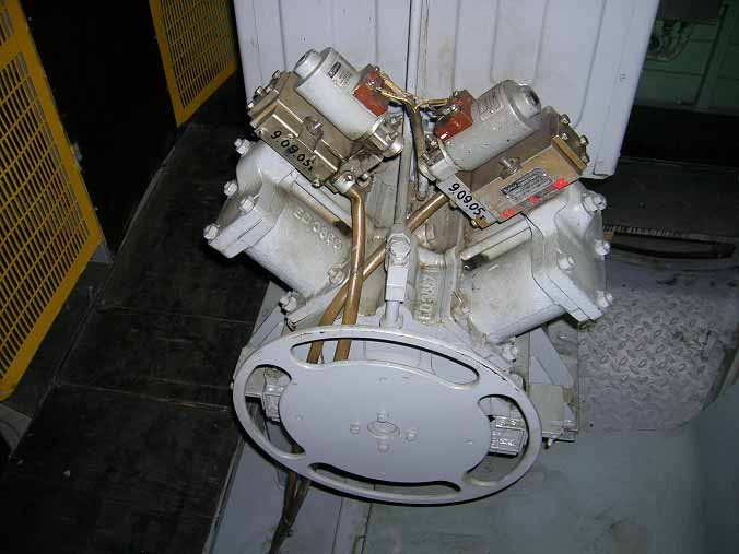 Пневмодвигатель промежуточного барабана контроллера, электровоз ЧС7